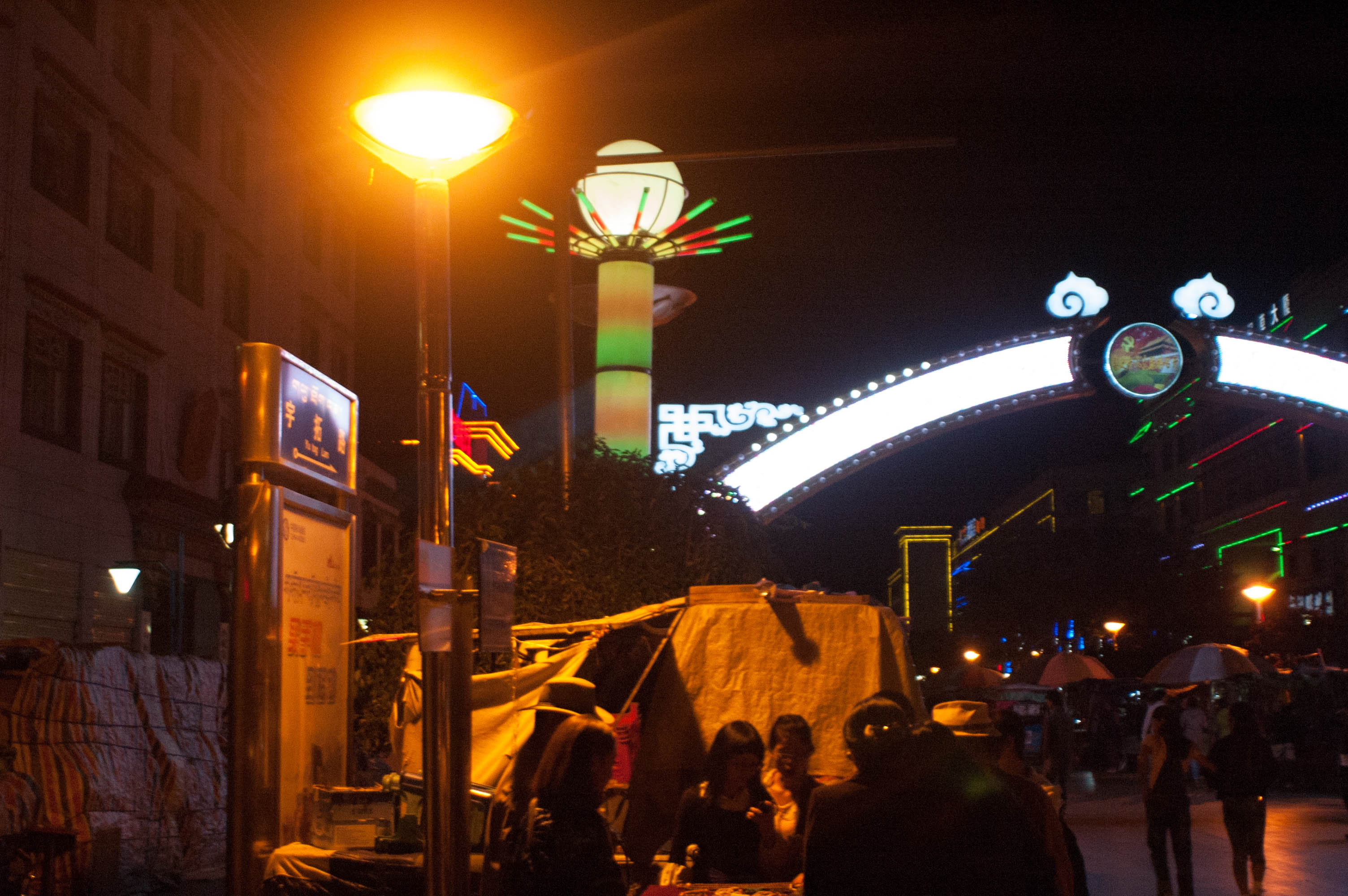 201308宇拓路